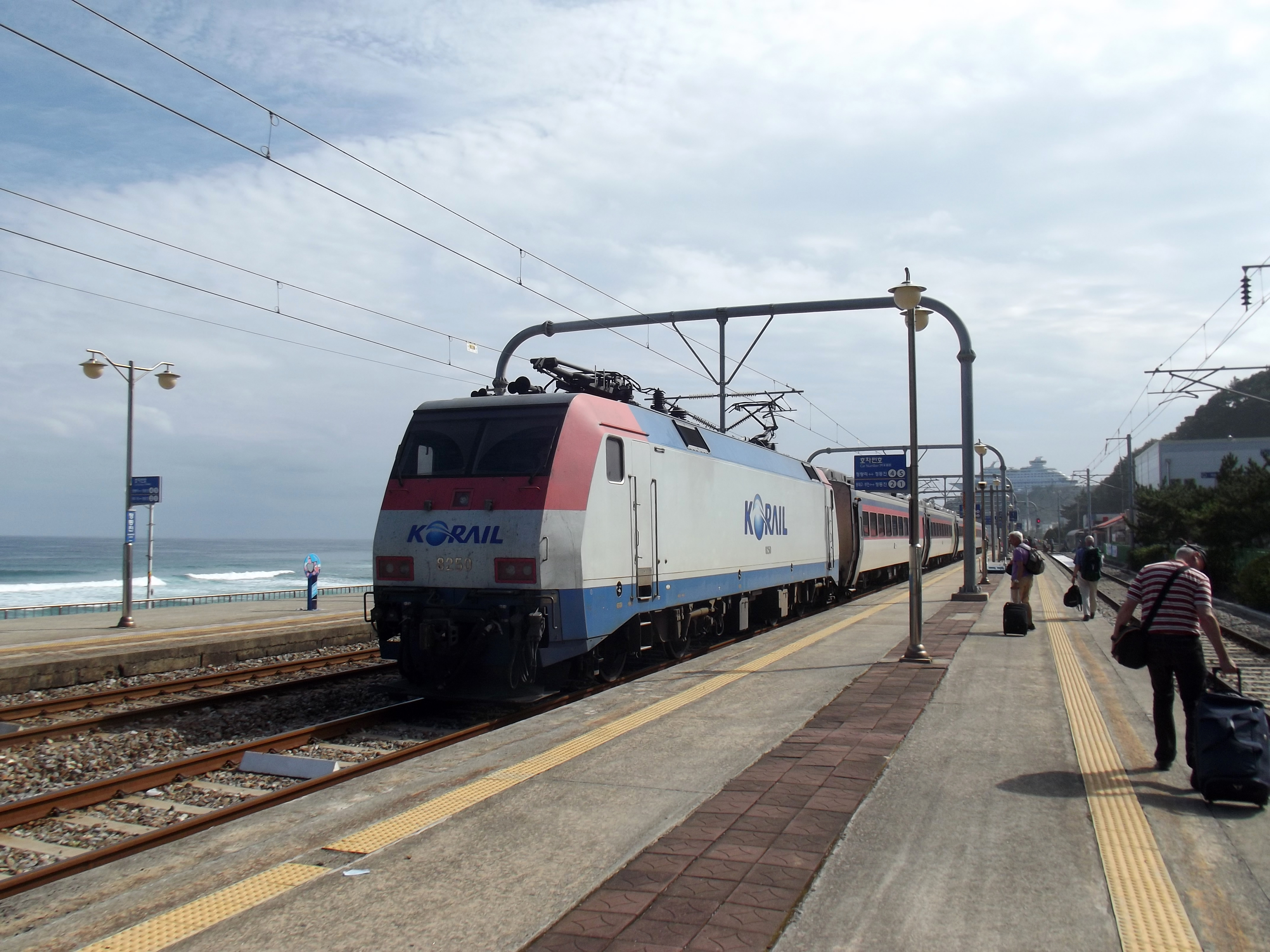 Trein langs bij Jeongdongjin station gelegen lang het strand